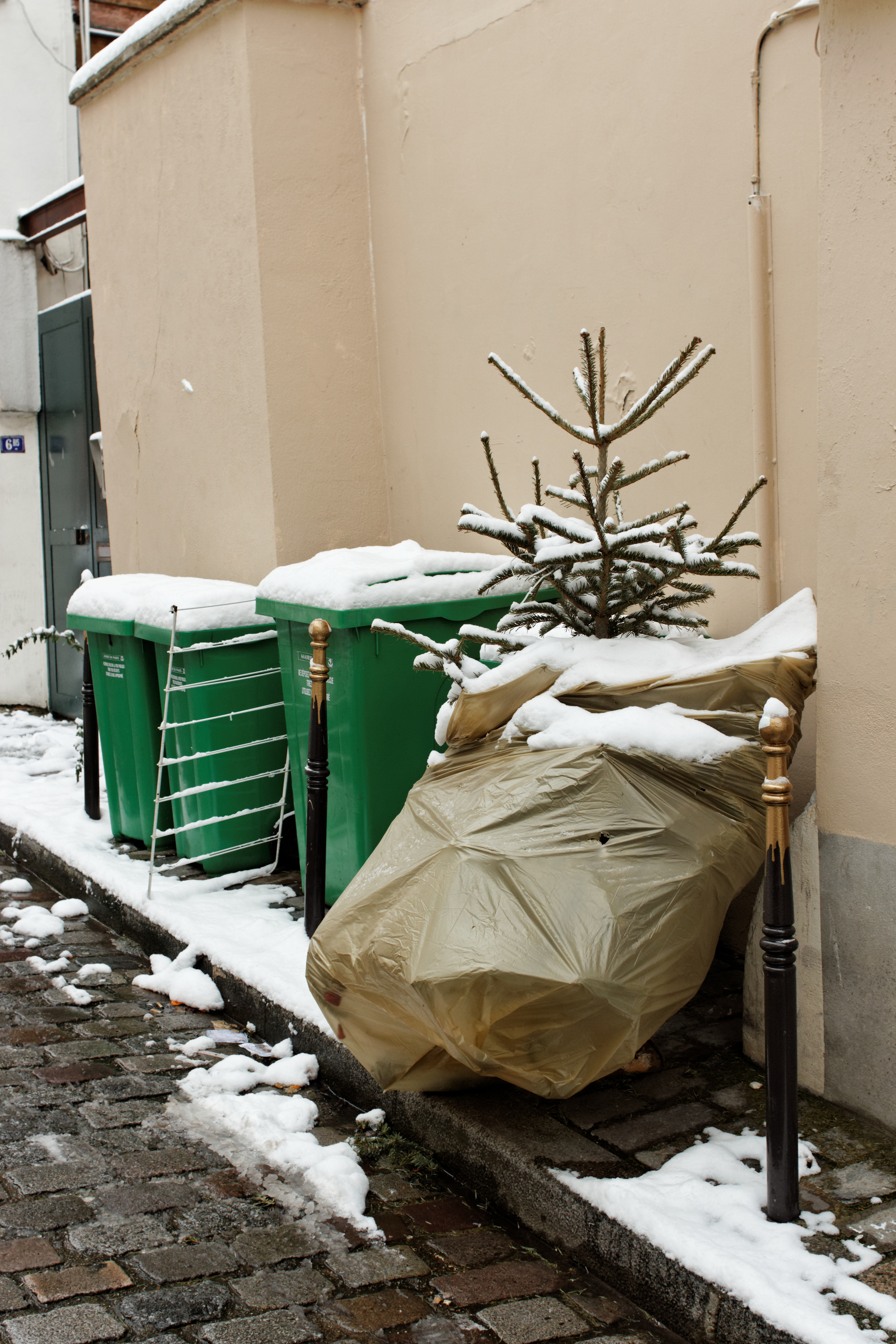 Sapin de Noël aux ordures, cité Aubry (Paris)